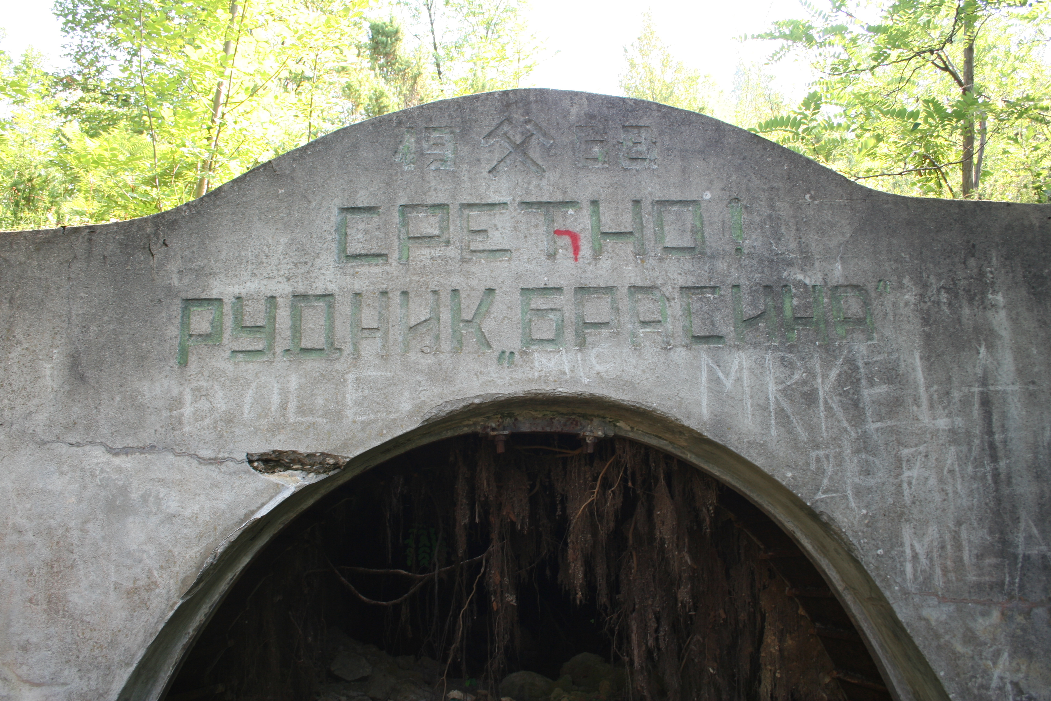 Rudnik Brasina